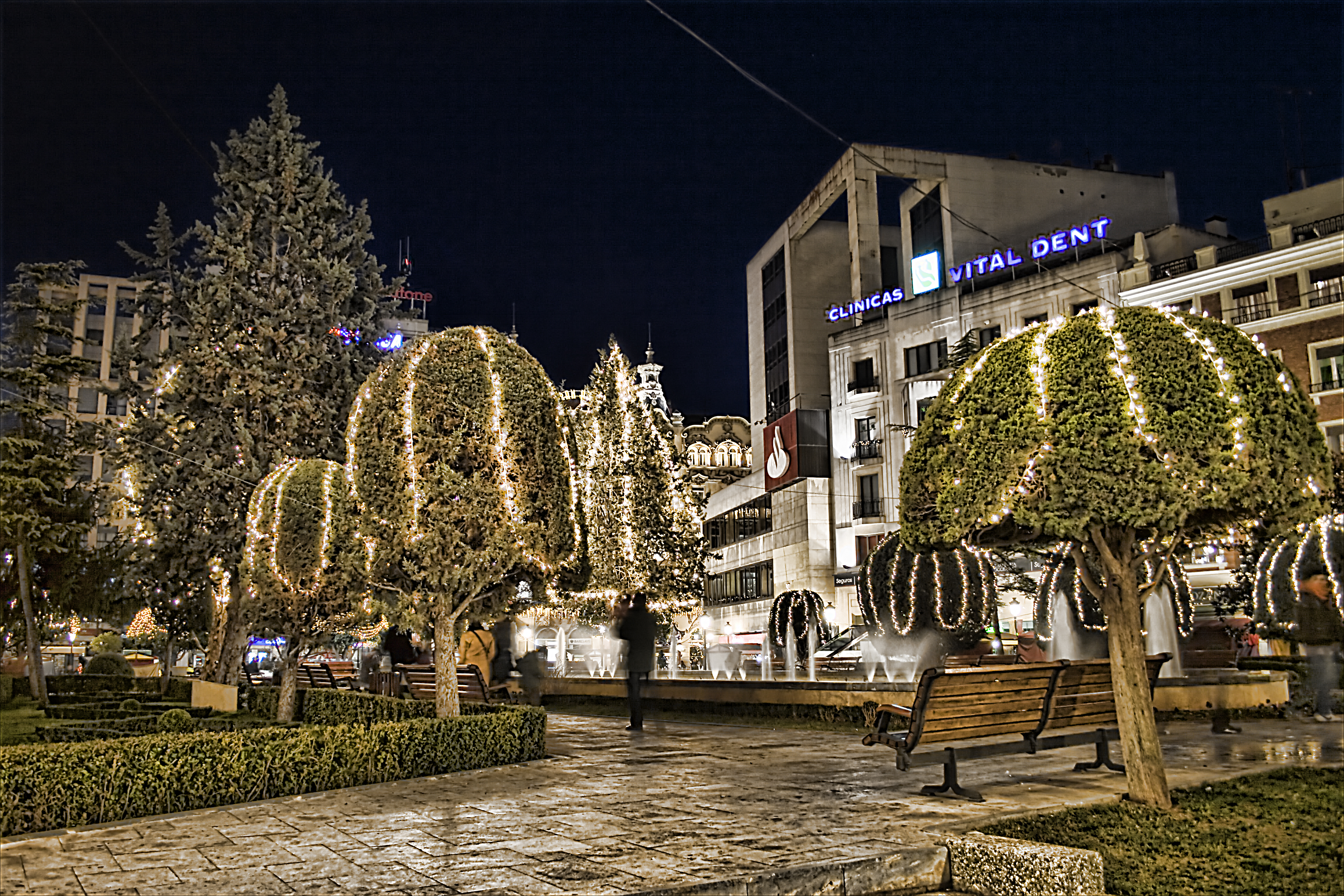 Sigo con la serie del Photowalk.